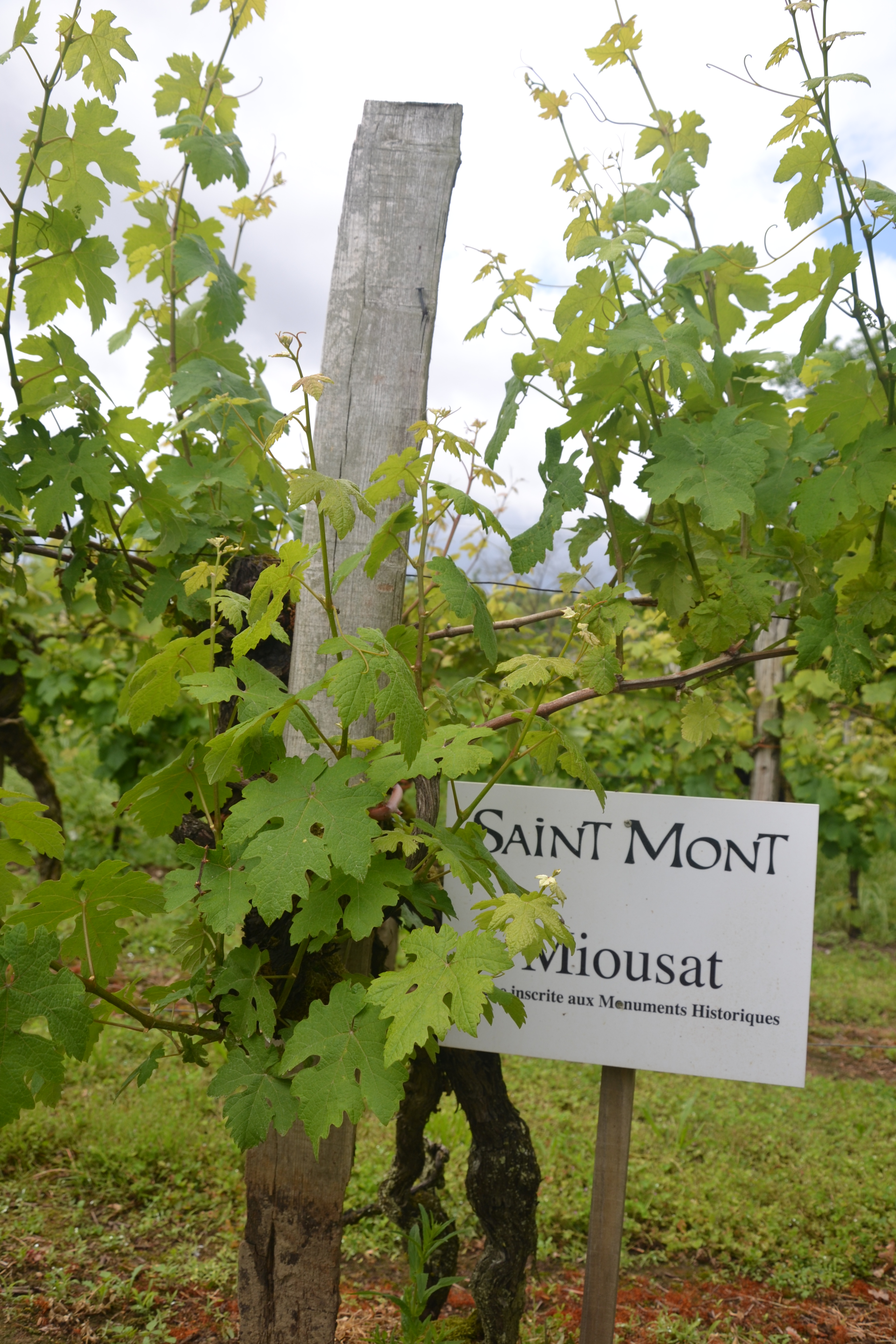 Parcelle de vigne pré-phyloxéra, probablement plantée sous le règne de Napoléon III .